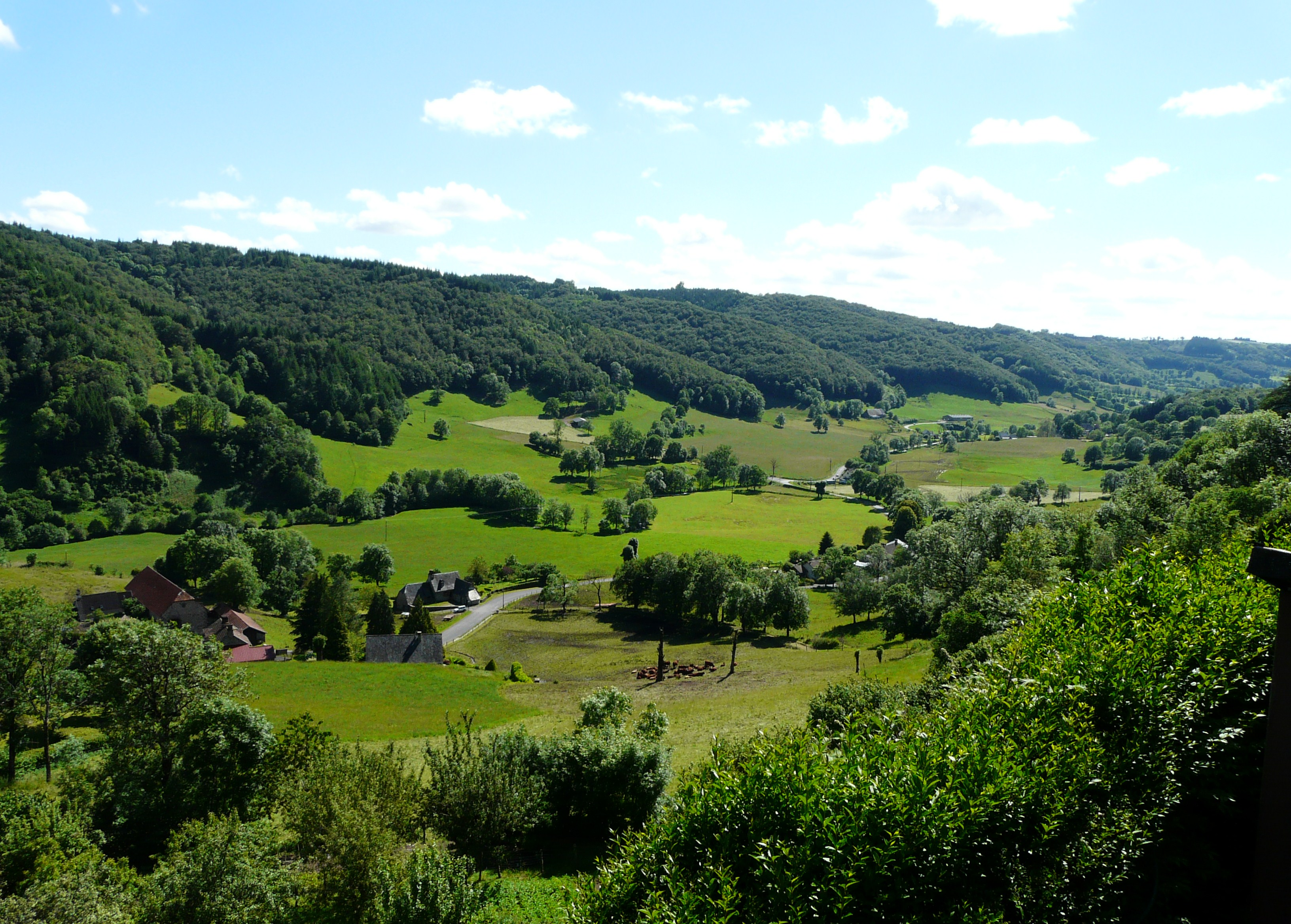 La vallée de la Doire à Tournemire, Cantal, France. Vue prise en direction de l'aval.